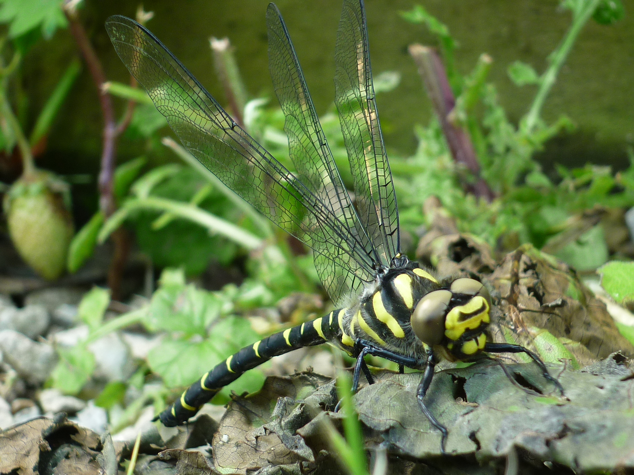 Libellule, Cordulegastre Bidenté, Cordulegaster bidentata, liste rouge mondiale de l'UICN des espèces menacées en catégorie NT, les yeux bien visibles